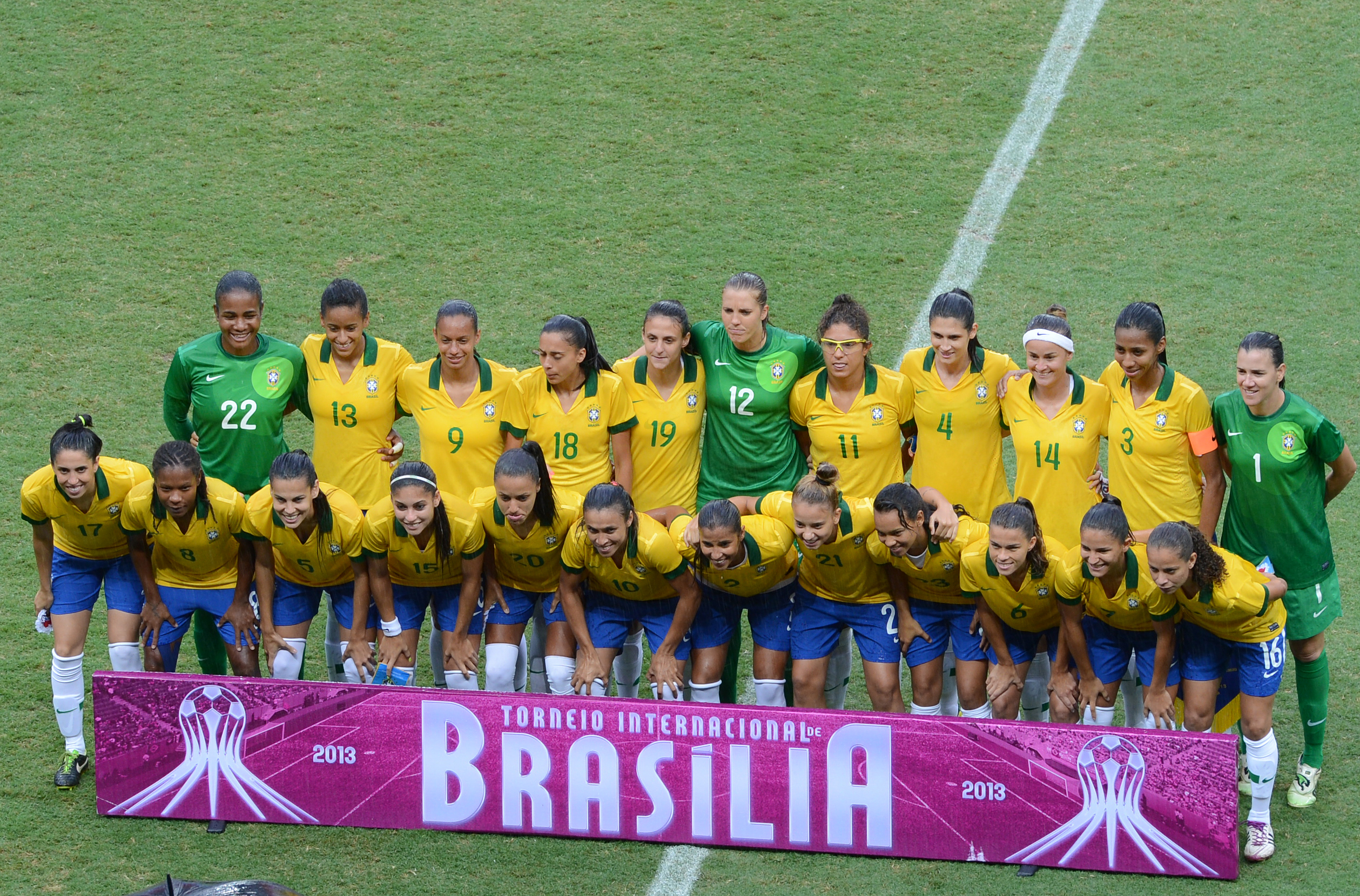 Selecionado feminino do Brasil, campeãs do Torneio Internacional de Brasília - 2013